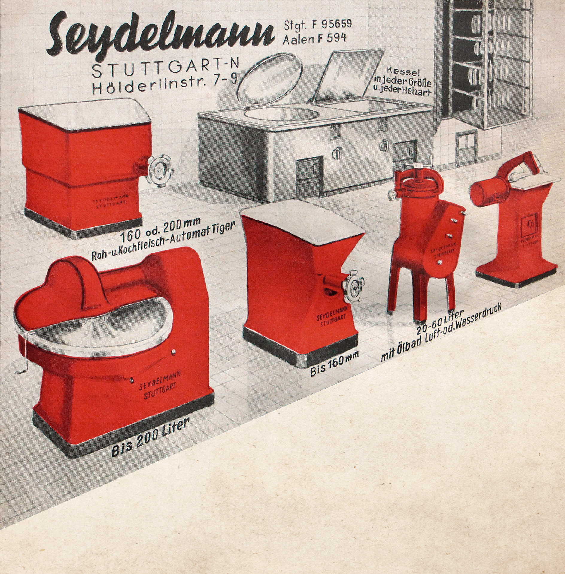 Seydelmann Produktportfolio 1951